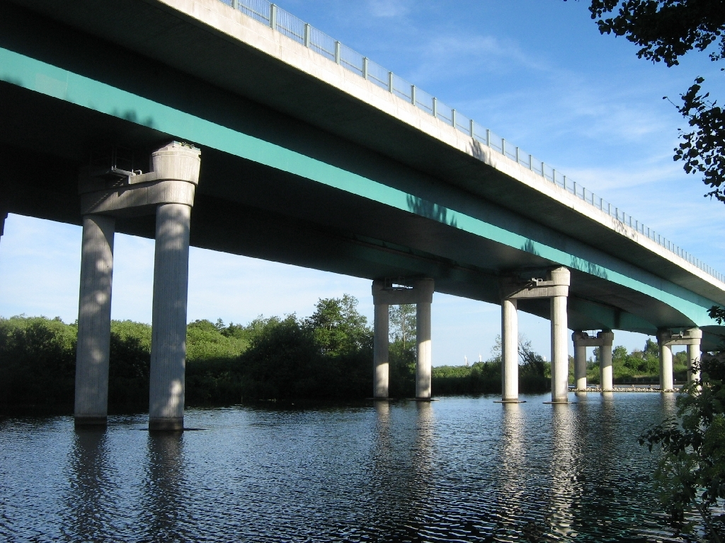 Die 1.100 m lange Brücke der Bundesautobahn A20 über dem Tal der Peene bei Jarmen (Mecklenburg-Vorpommern, Germany)